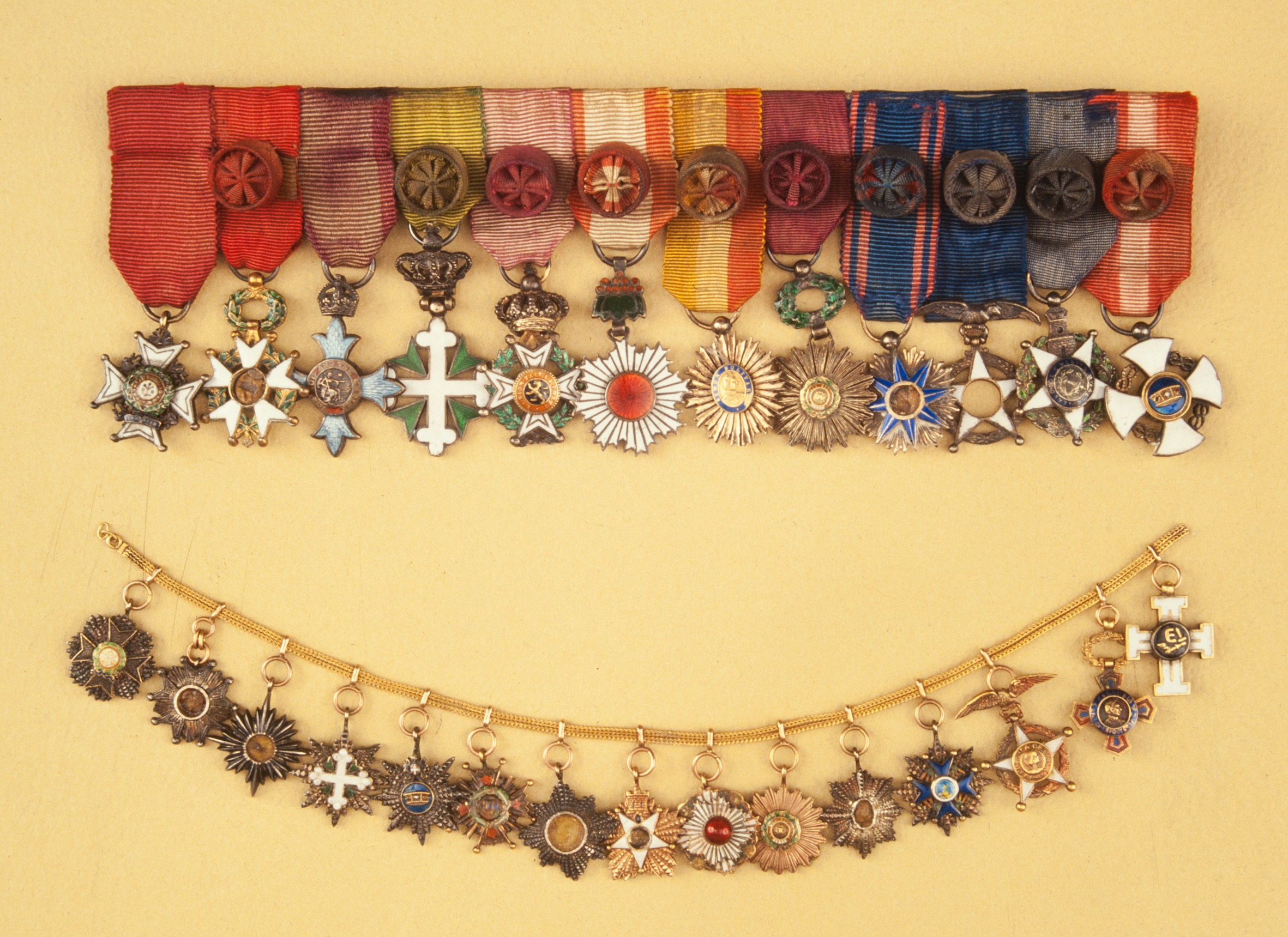 Miniaturas pertenecientes al Presidente Marcelo T. de Alvear para su uso con vestimenta de gala.